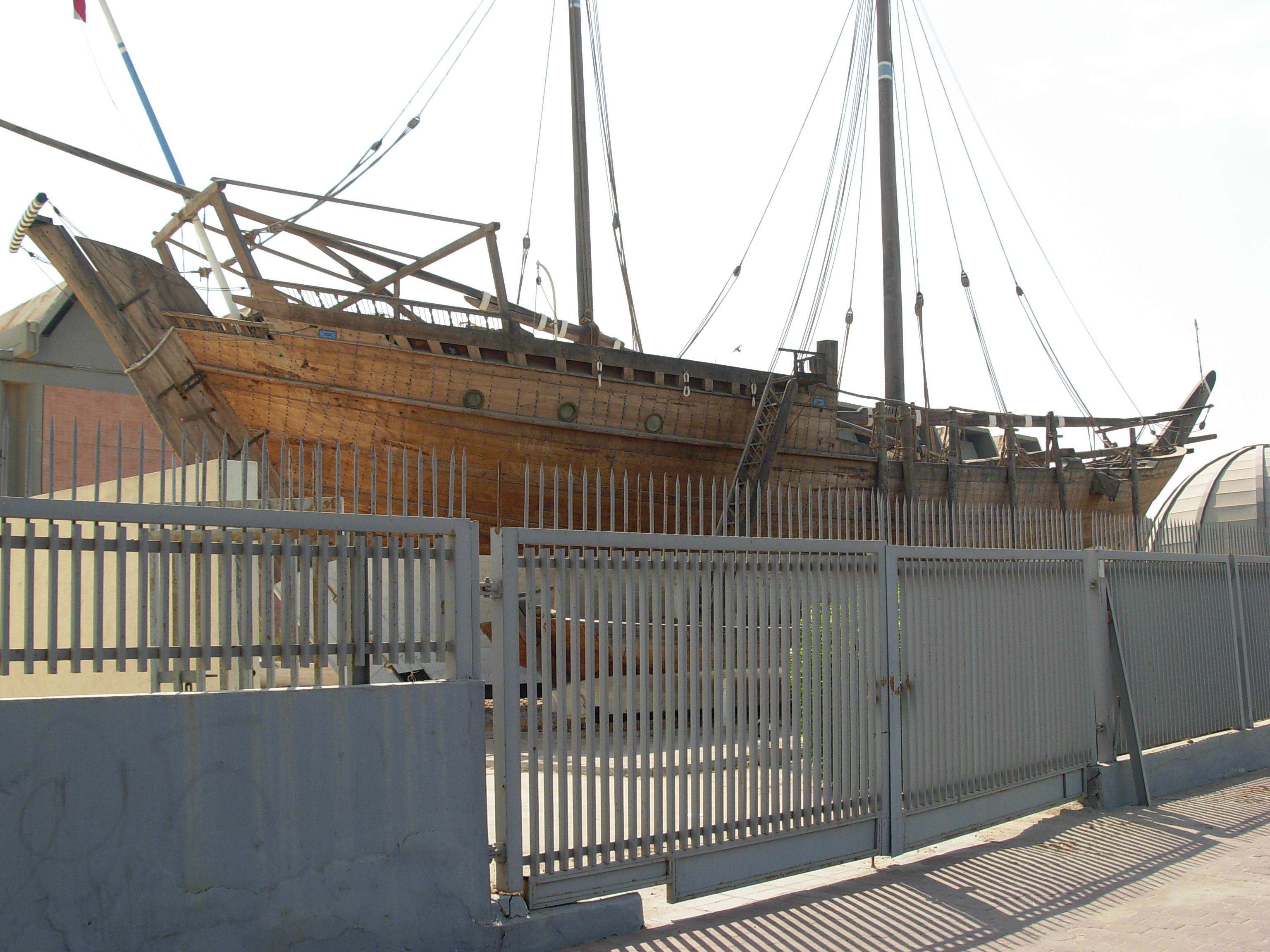 പത്തേമാരി, കുവൈറ്റ് നാഷനൽ മ്യുസ്യത്തിൽ സൂക്ഷിച്ചിരിക്കുന്നു